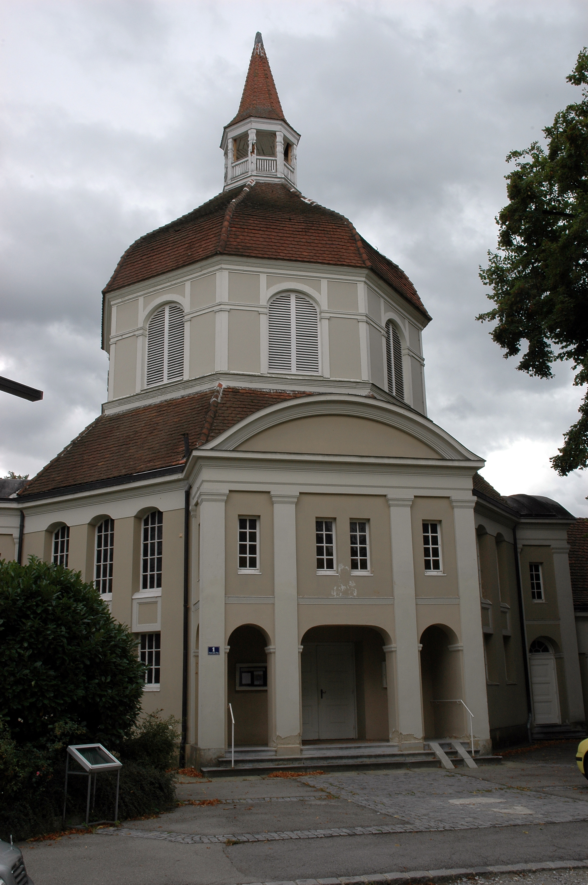 Evang. Pfarrkirche A.B., Martin-Luther-Kirche, Martin Luther Platz 1